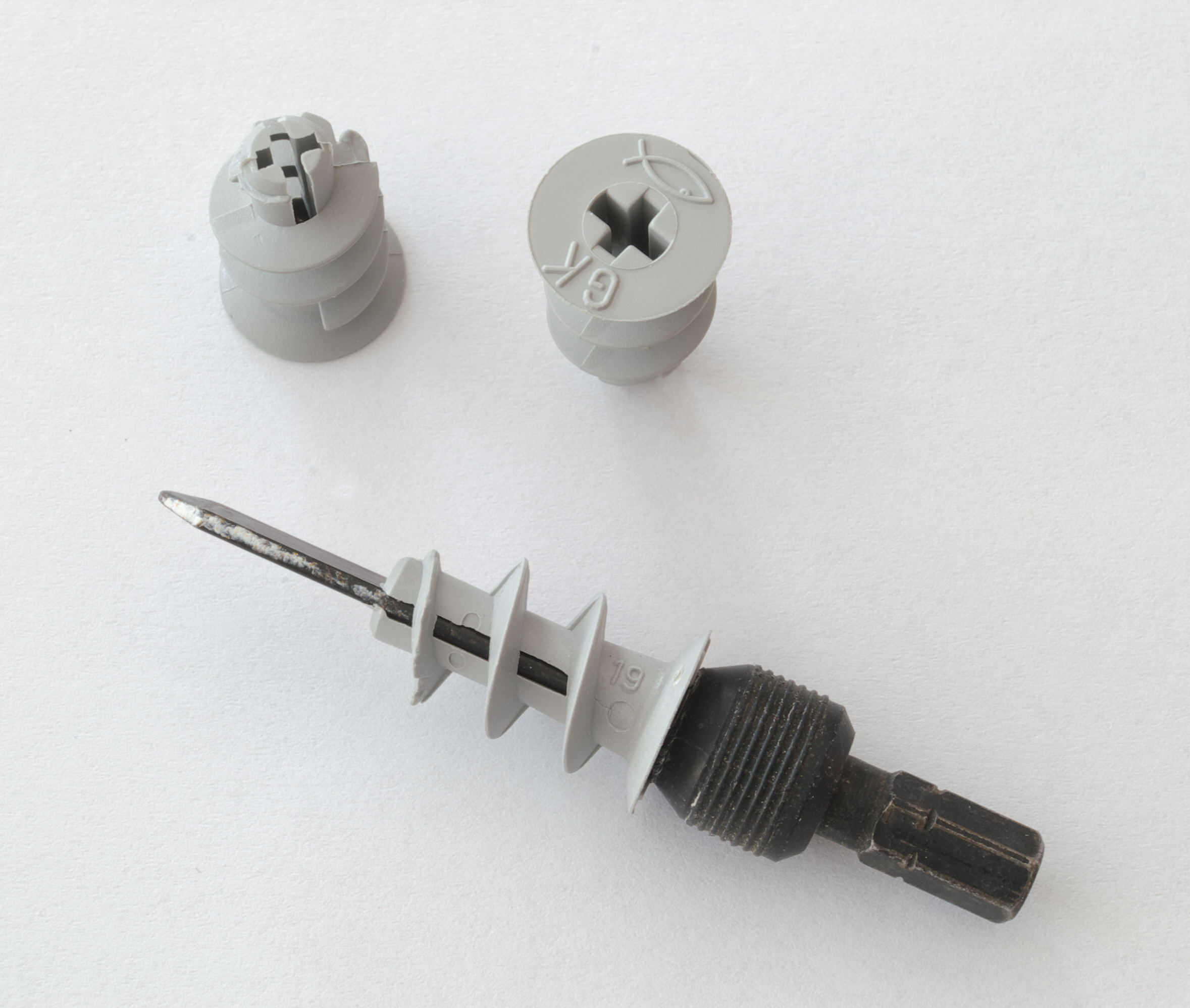 Dübel und Montagewerkzeug für Gipskartonplatten